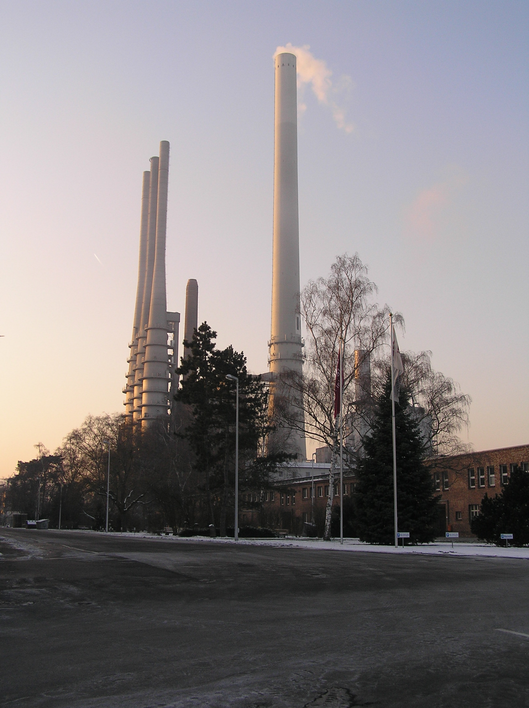 Die ehem. Glanzstoffabrik in Erlenbach am Main, heute Industrie Center Obernburg (ICO)